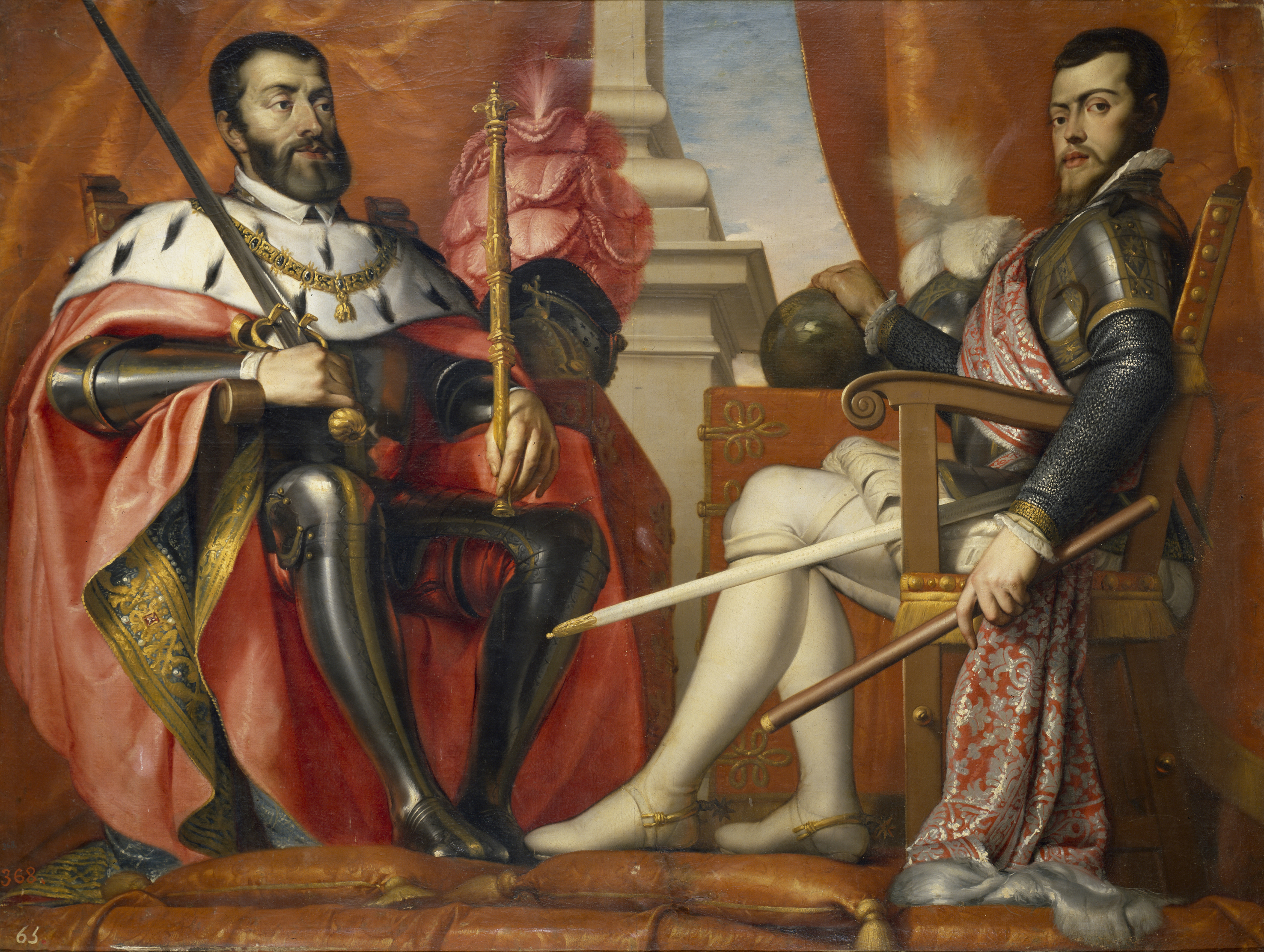 La obra representa al emperador Carlos I de España (1500-1558) y a su hijo, el rey Felipe II de España (1527-1598).